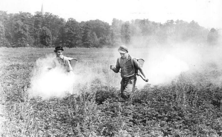 Blausig, Kartoffelkäferbekämpfung Zentralbild Krueger 15.8.1953 Kartoffelkäferbekämpfung Kollegen des volkseigenen Gutes in Blausig bei Leipzig bestäuben die Kartoffelfelder mit dem Kontaktgift "Gesarol", um die Kartoffelkäferplage einzudämmen. UBz: Kollegen des Gutes bei der Arbeit.